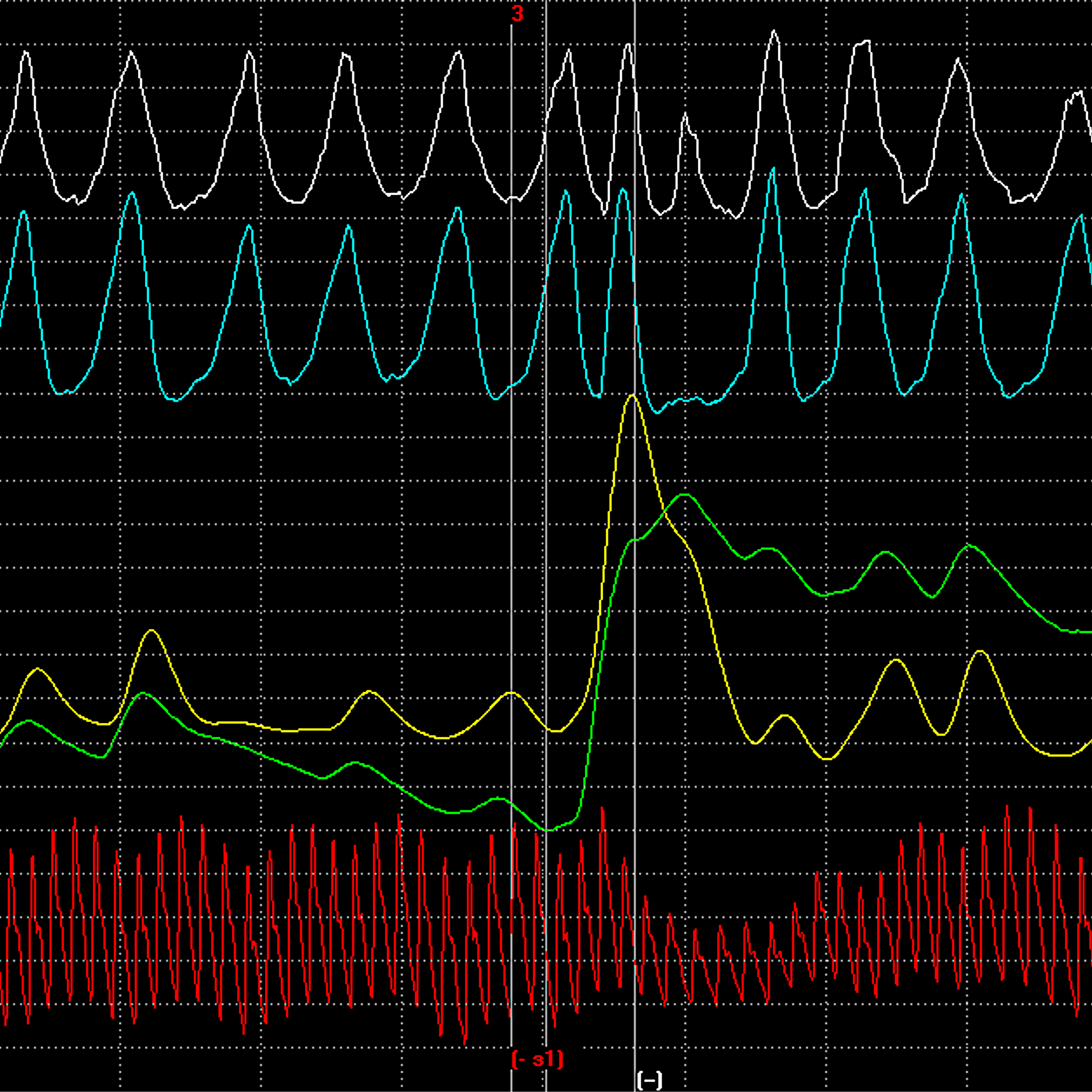 Полиграмма: фон — реакция — фон